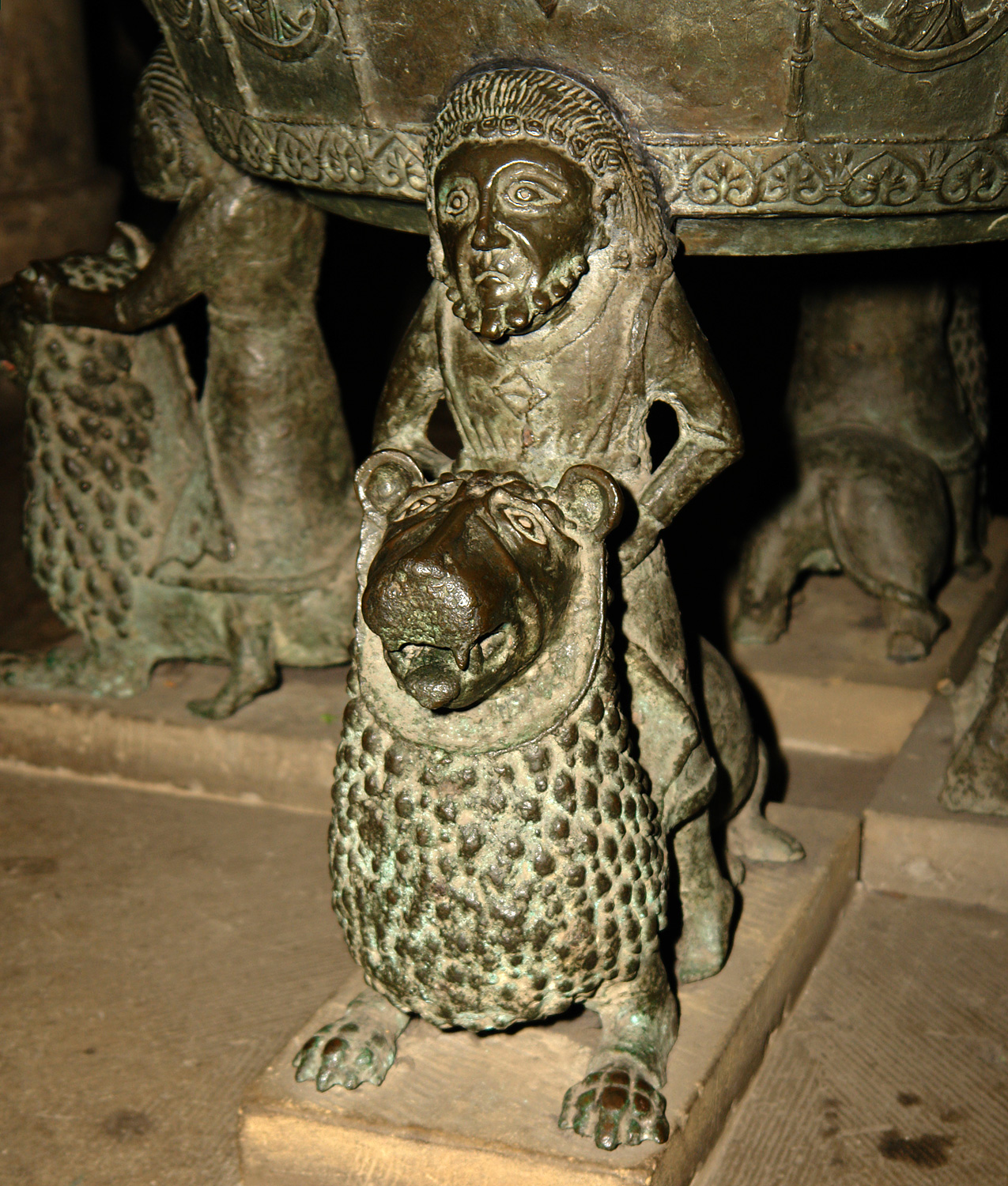 Bremer St. Petri Dom: Taufbecken (um 1220) in der Westkrypta. Ein Meisterwerk spätromanischer Bronzegießkunst, das zu den prächtigsten und ältesten dieser Art zählt. Die Bedeutung der vier auf Löwen reitenden Figuren ist nicht geklärt. In den oberen Rundbögen sind 26 Figuren dargestellt, in den unteren 12 Halbfiguren. (Qu.: Der Dom zu Bremen, ISBN 3-7845-4231-X)